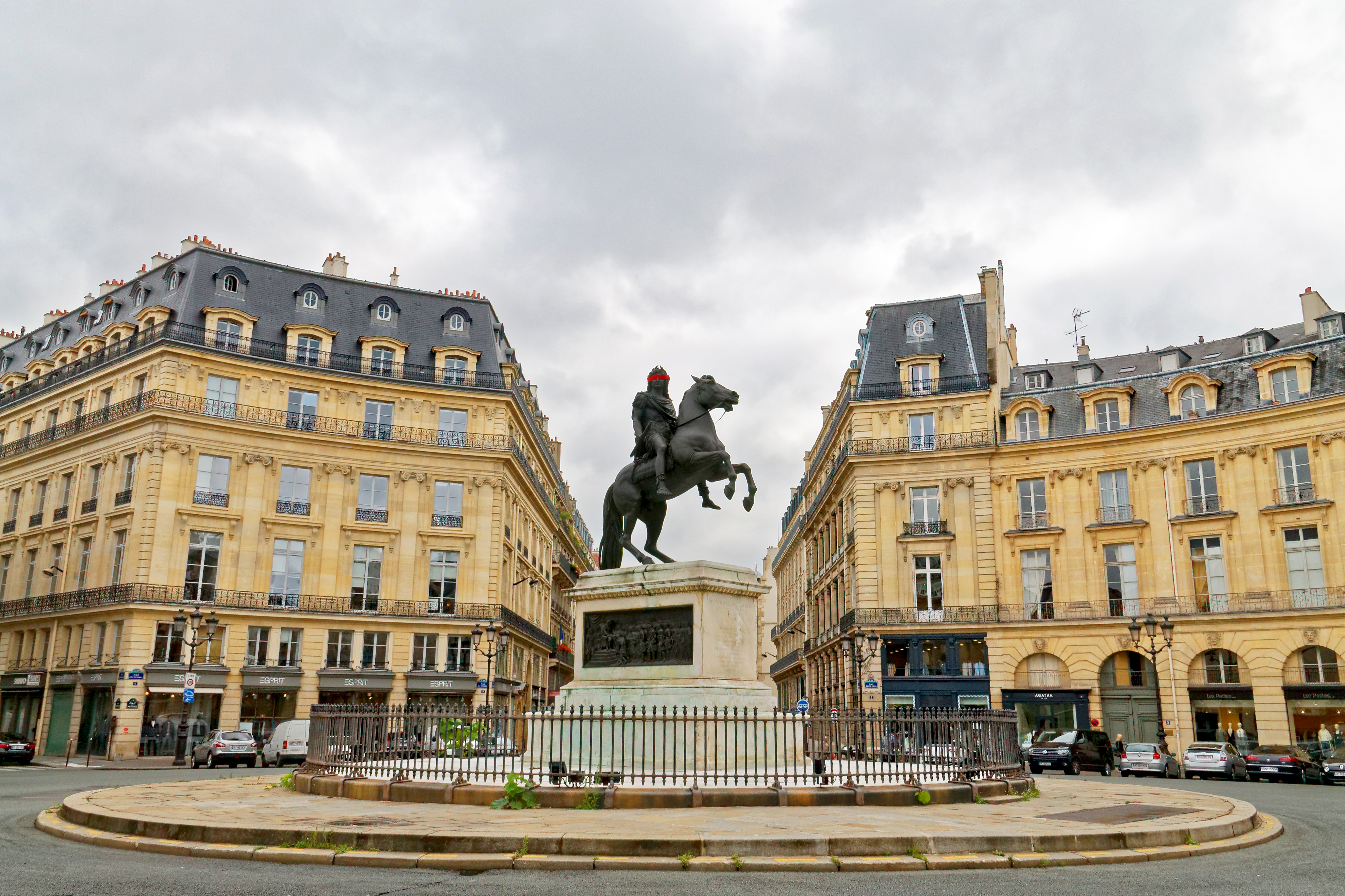 Place des Victoires, Paris.